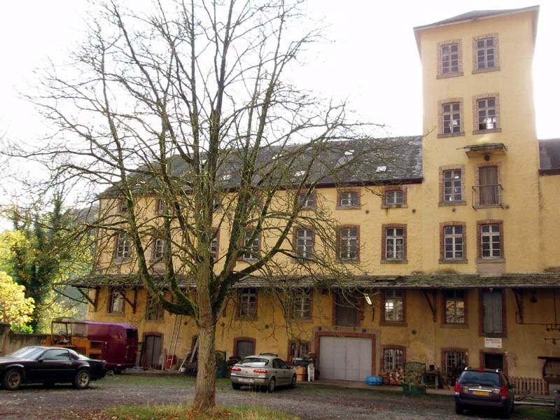 D'Banmille vu Bettenduerf (haut ausser Betrib). November 2005